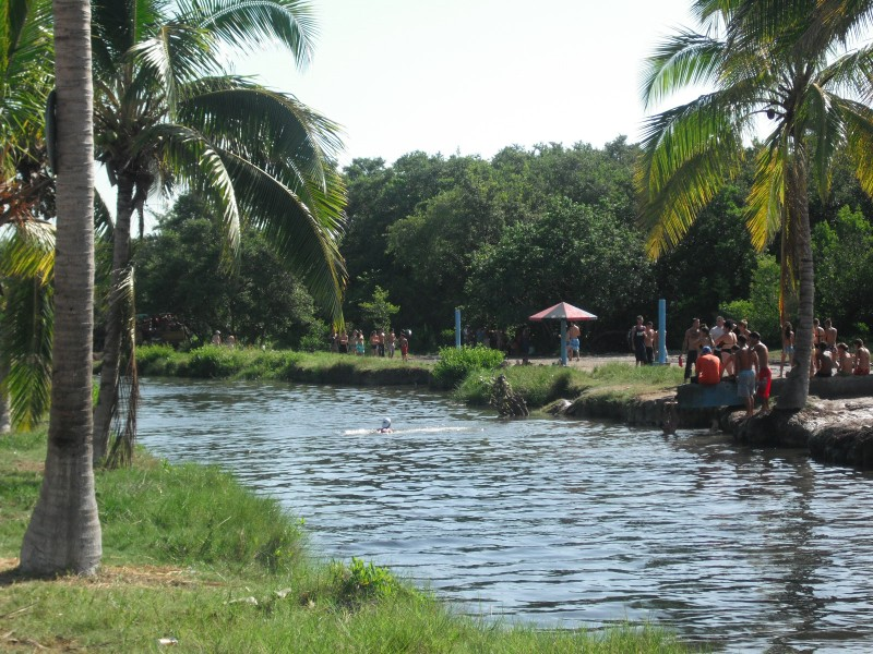 Vista del Río Mayabeque contrario a la desembocadura